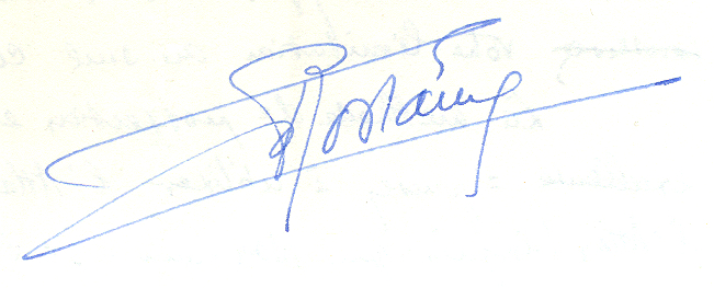 Signature à l'encre bleue de Charles Rostaing (1904-1999).